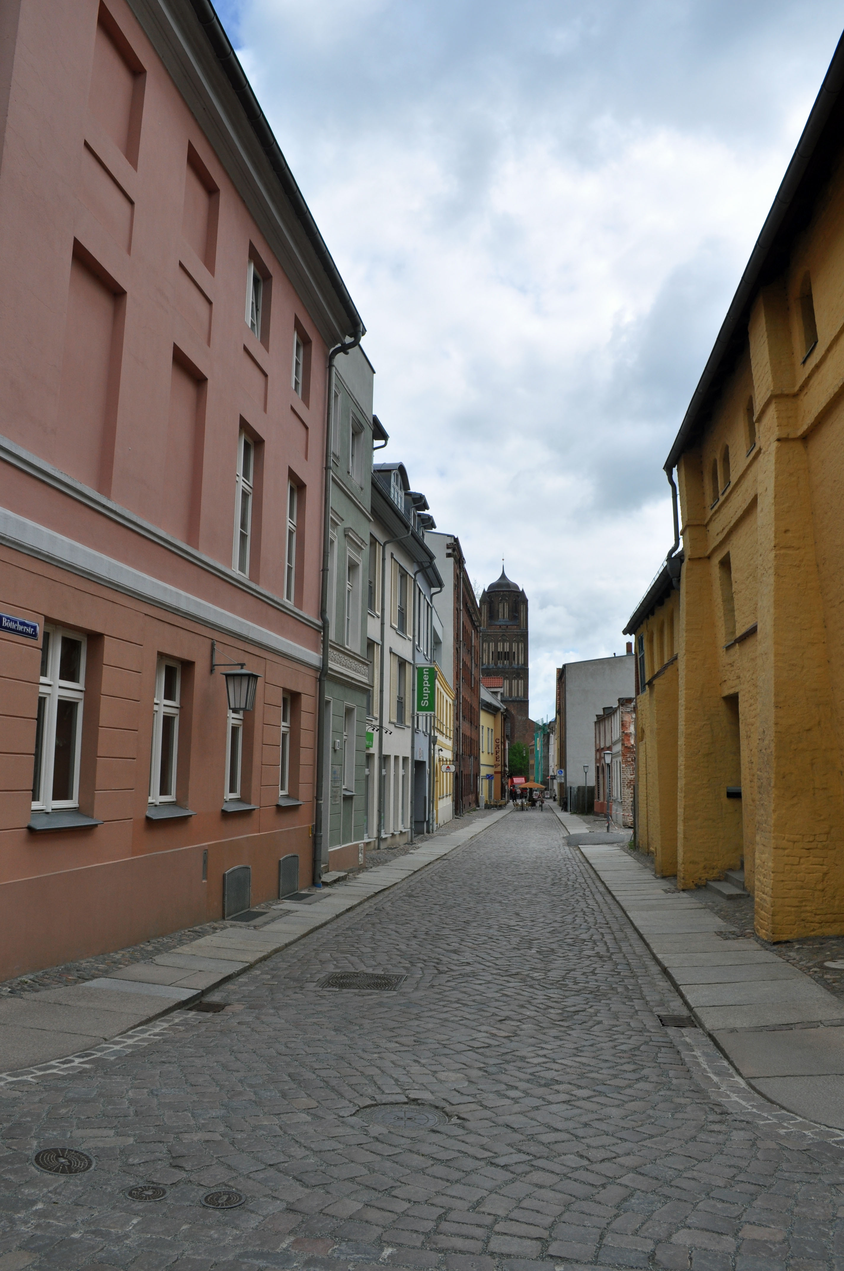 Gebäude in Stralsund, siehe Dateiname